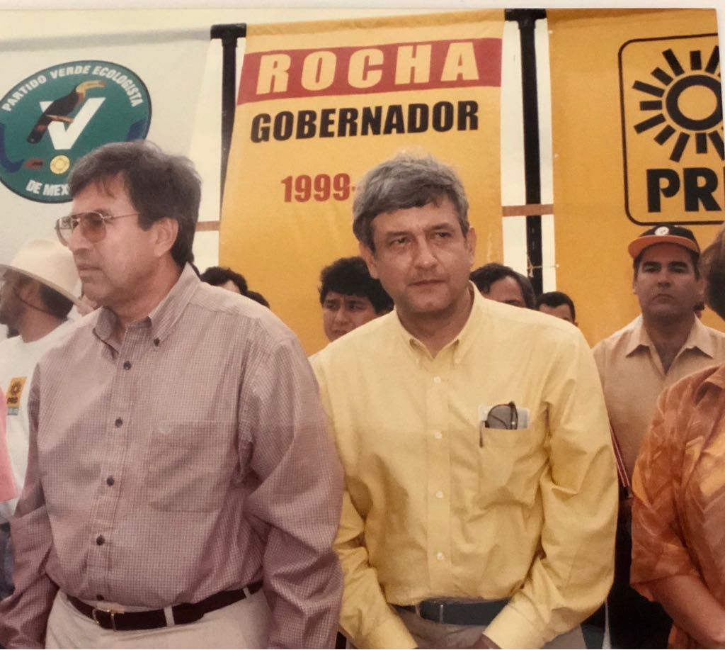 Rubén Rocha Moya en un acto de campaña para la gubernatura de Sinaloa en 1998, acompañado por Andrés Manuel López Obrador, quien en ese entonces fungía como Presidente del Partido de la Revolución Democrática